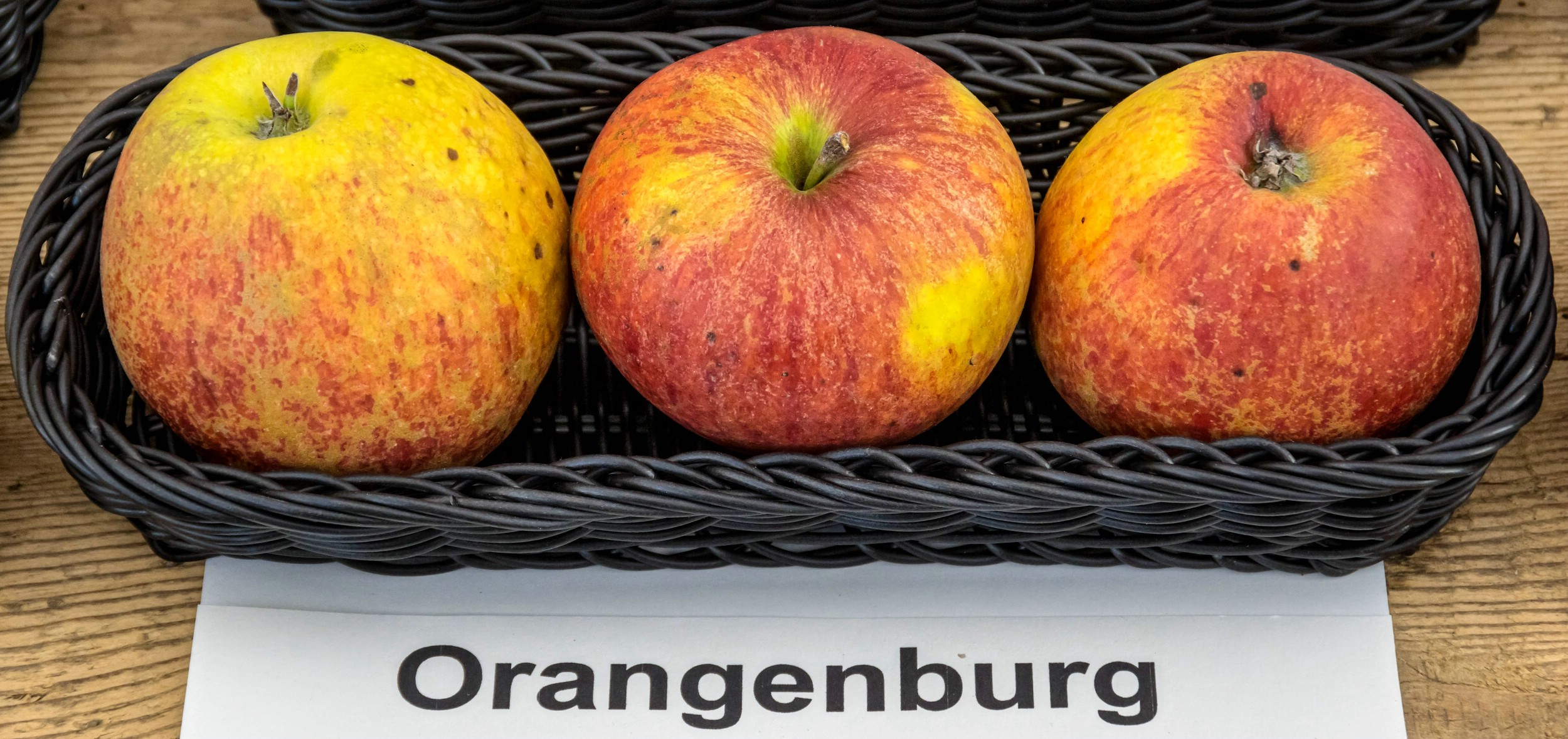 Alte Apfelsorten, von denen es im Badischen noch tragende Bäume gibt. Alle Aufnahmen au dem Oktober 2015